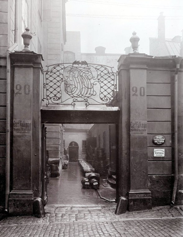 Portalen till Svartmangatan 20 och gårdsplan